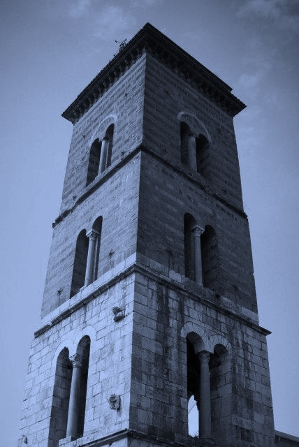 Campanile della Cattedrale